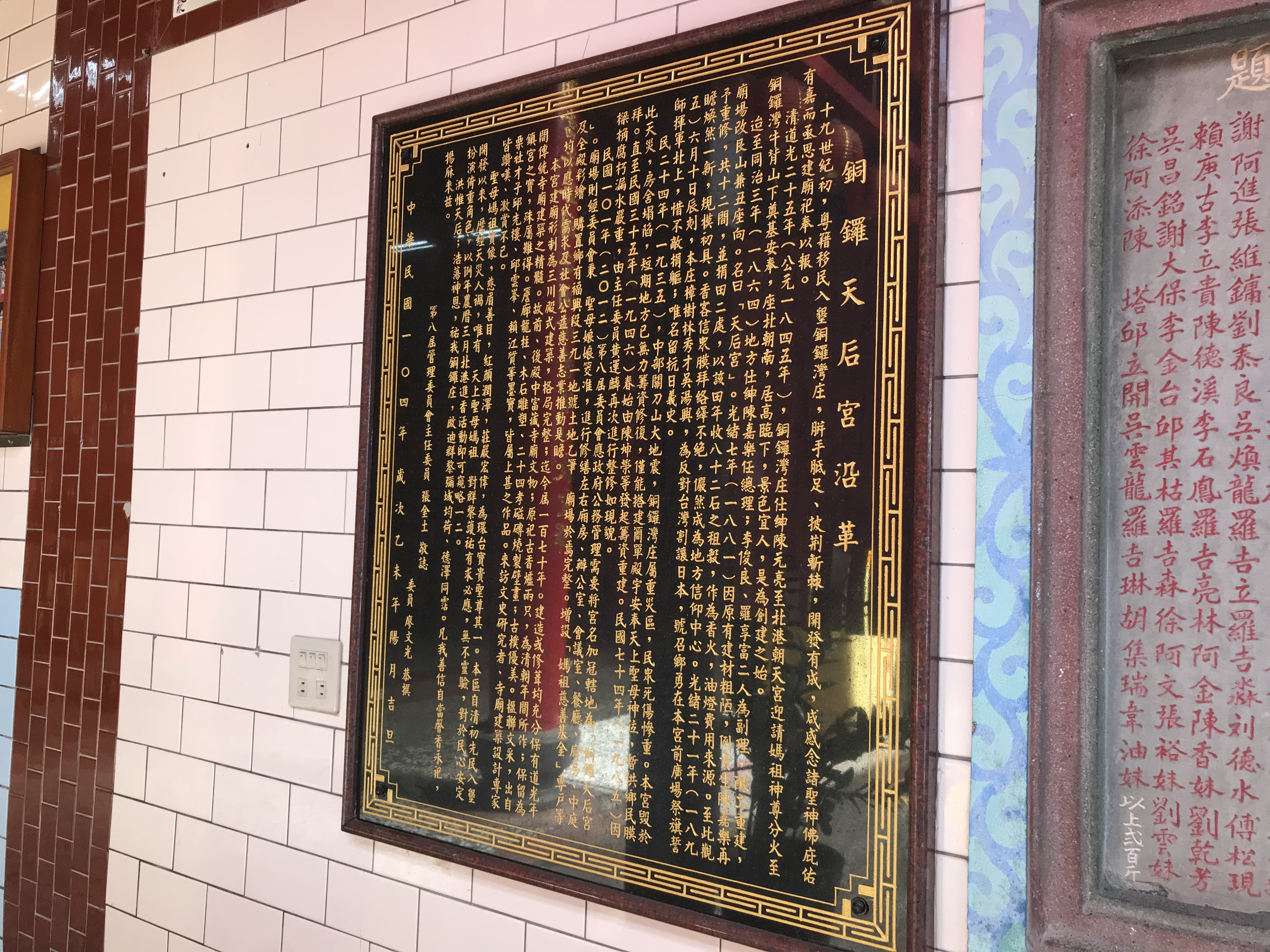 銅鑼天后宮沿革